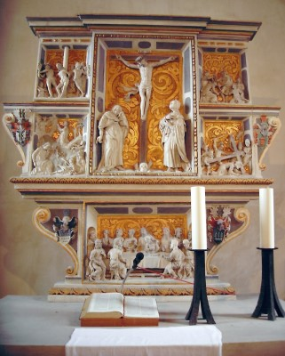 Altar in Biegen